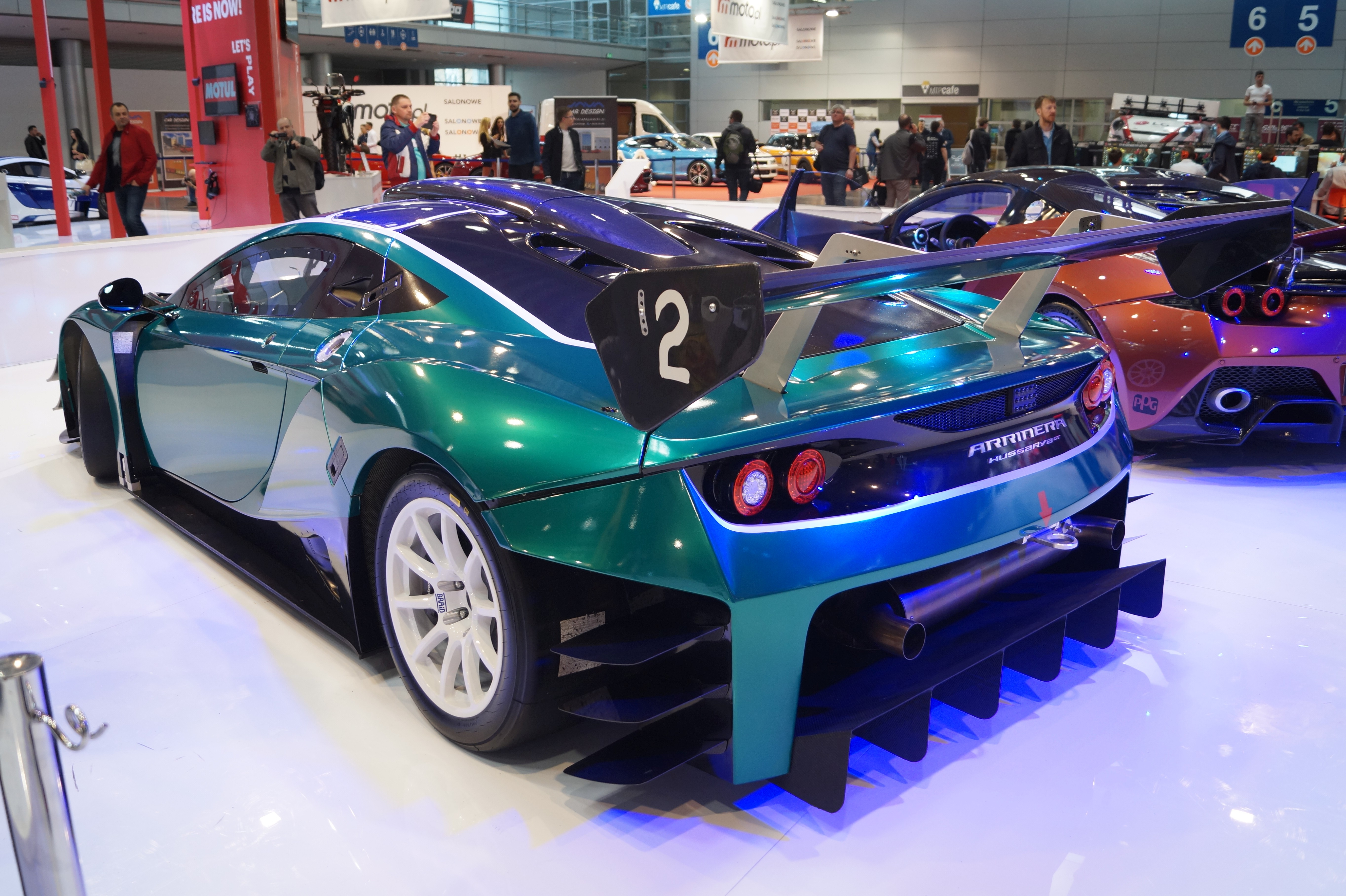 Lewy tył Arrinery Hussarya GT na Motor Show Poznań 2017.